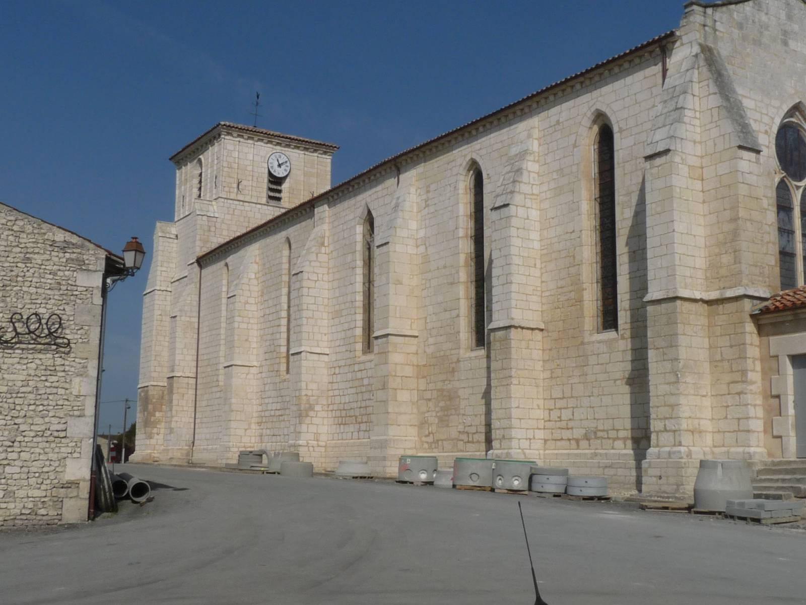 église de Salles-d'Angles, Charente, France